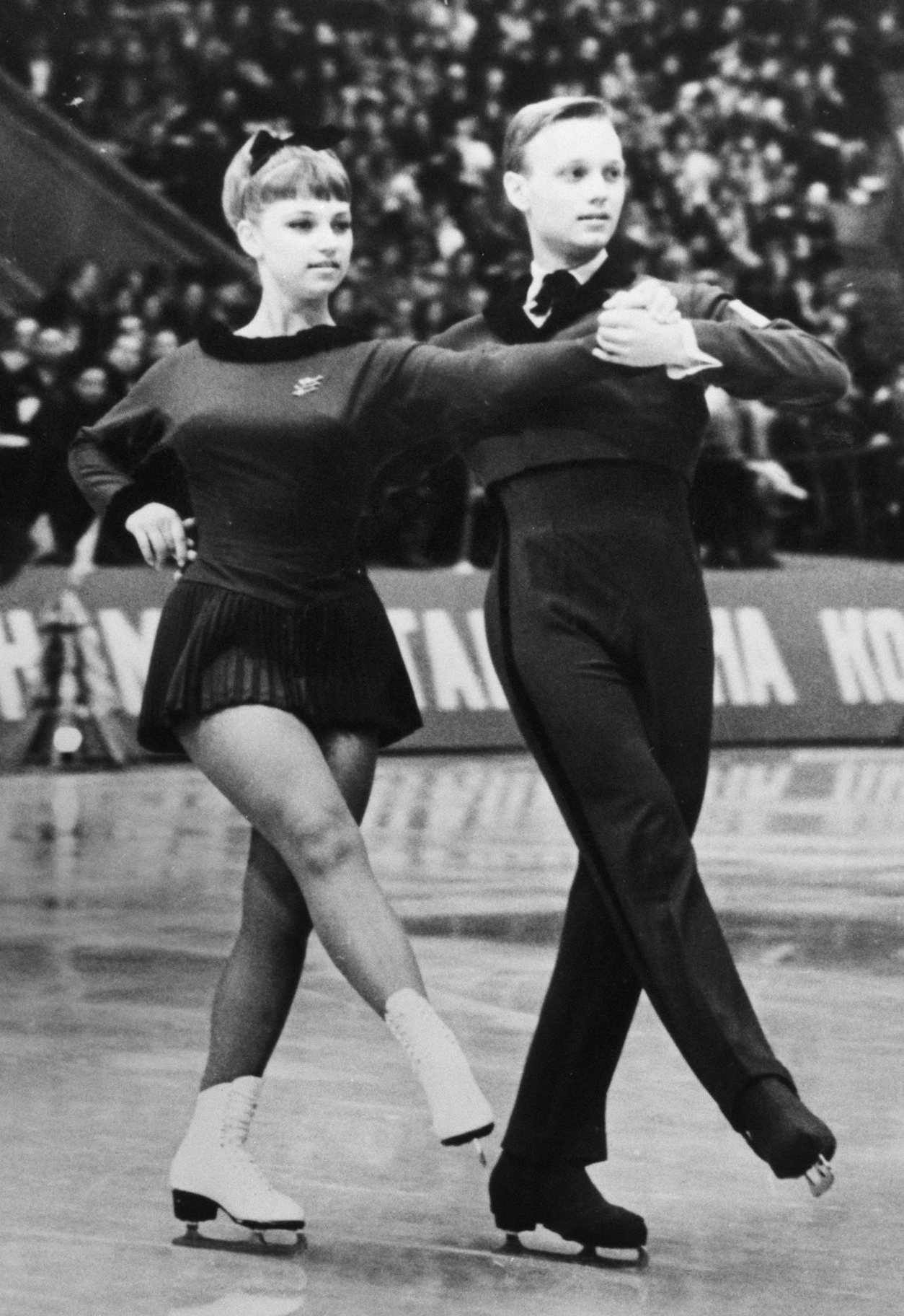 Eva Romanova en Pavel Roman in actie bij het paardansen. Foto is niet van het WK in Colarodo Springs maar van een ander evenement (zie cyrillisch schrift op boarding)